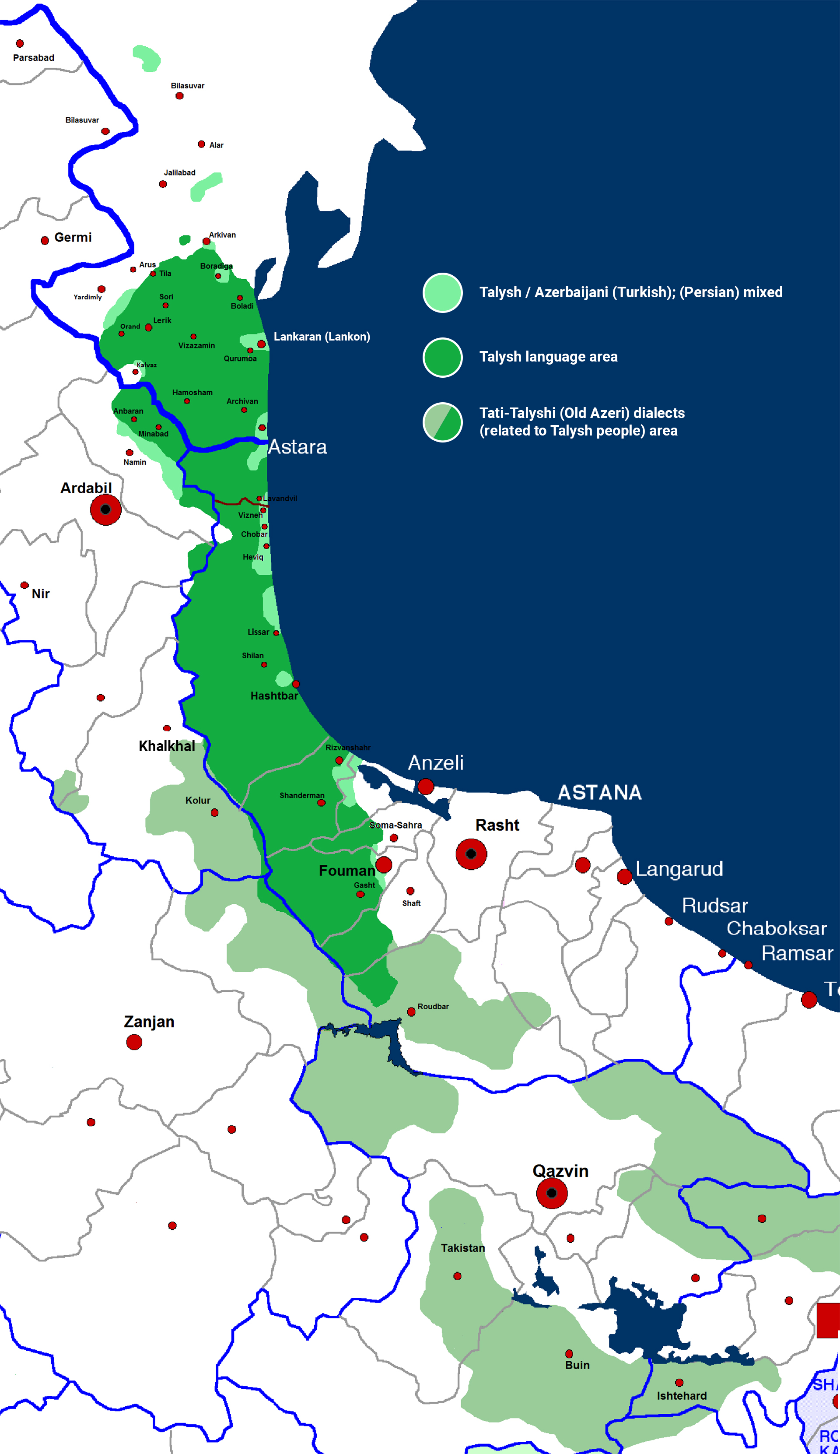 территория где распространен талышский язык. Карта показывает постепенную утрату языка в пунктах таких как -Астаре, Лисар, Гаресу, Аббасабад, Хавиг, Левендвил, Визна. А в Азербайджане на таких пунктах как г.Астара, селения Гилякаран, Зувуч, Зевина, Булюдул, Гендоб, Калваз, Калахан, Амбудара, Говдара, Борадига, Аллар